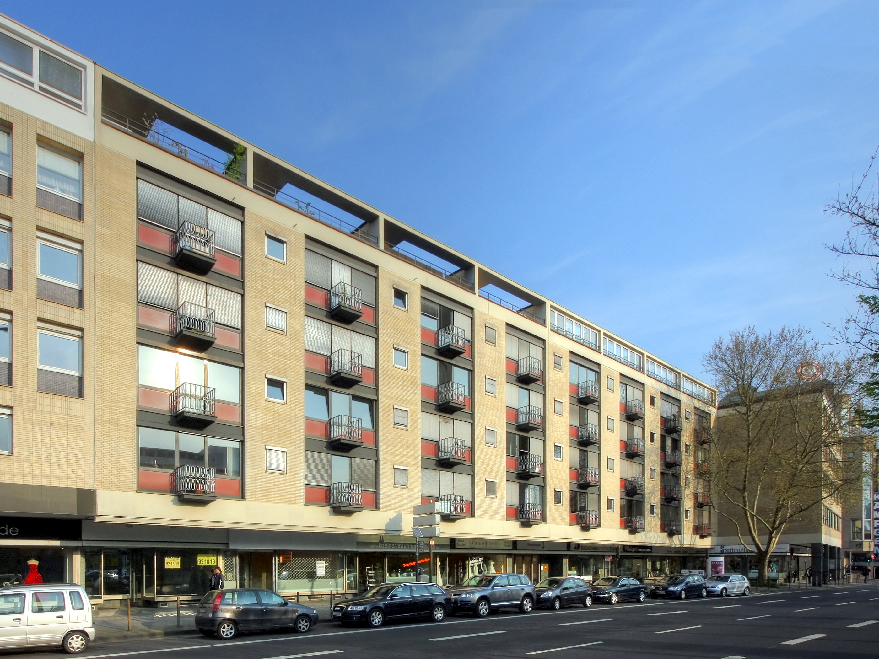 Wohn- und Geschäftshaus, Offenbachplatz 3, Köln. Architekt: Wilhelm Riphahn. Baujahr: ?